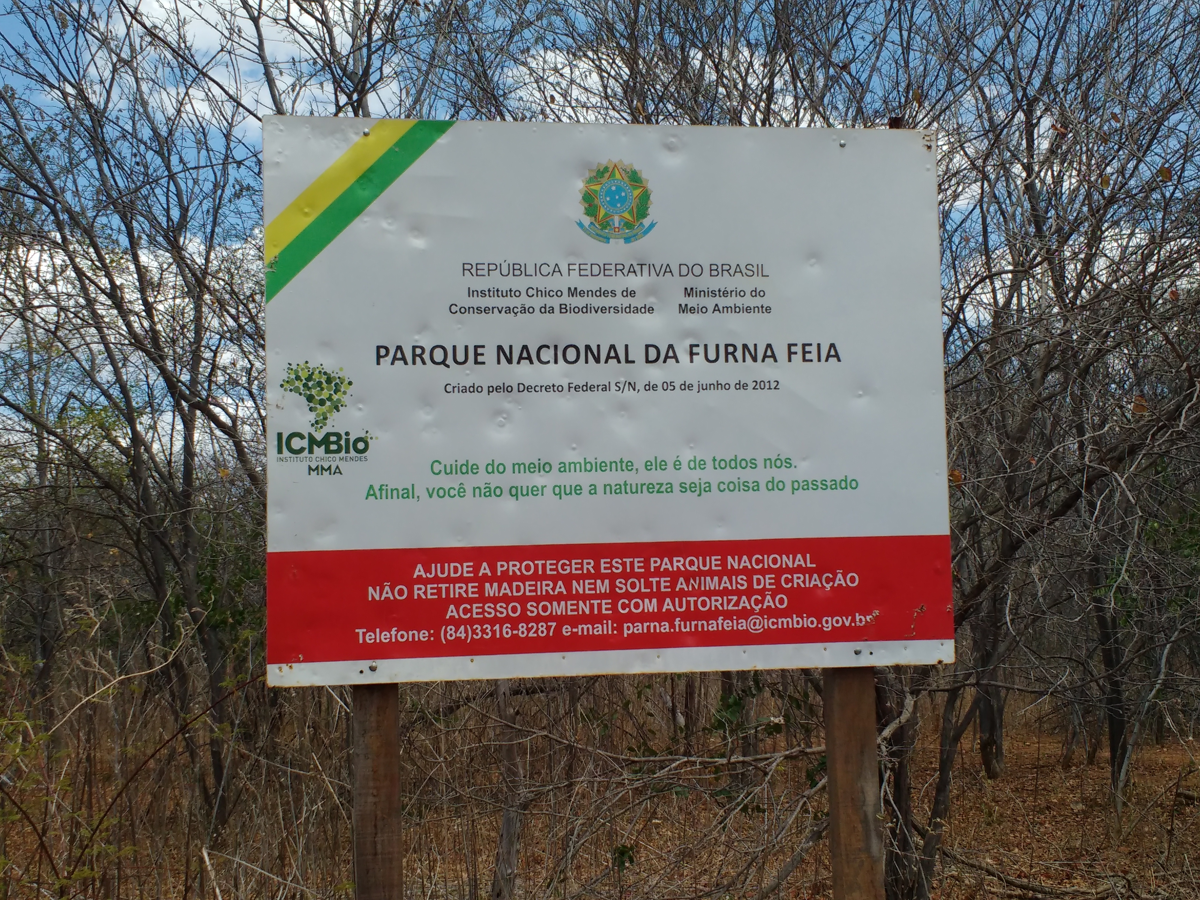 Placa de entrada do Parque Nacional da Furna Feia na zona rural de Baraúna, Rio Grande do Norte (Brasil)